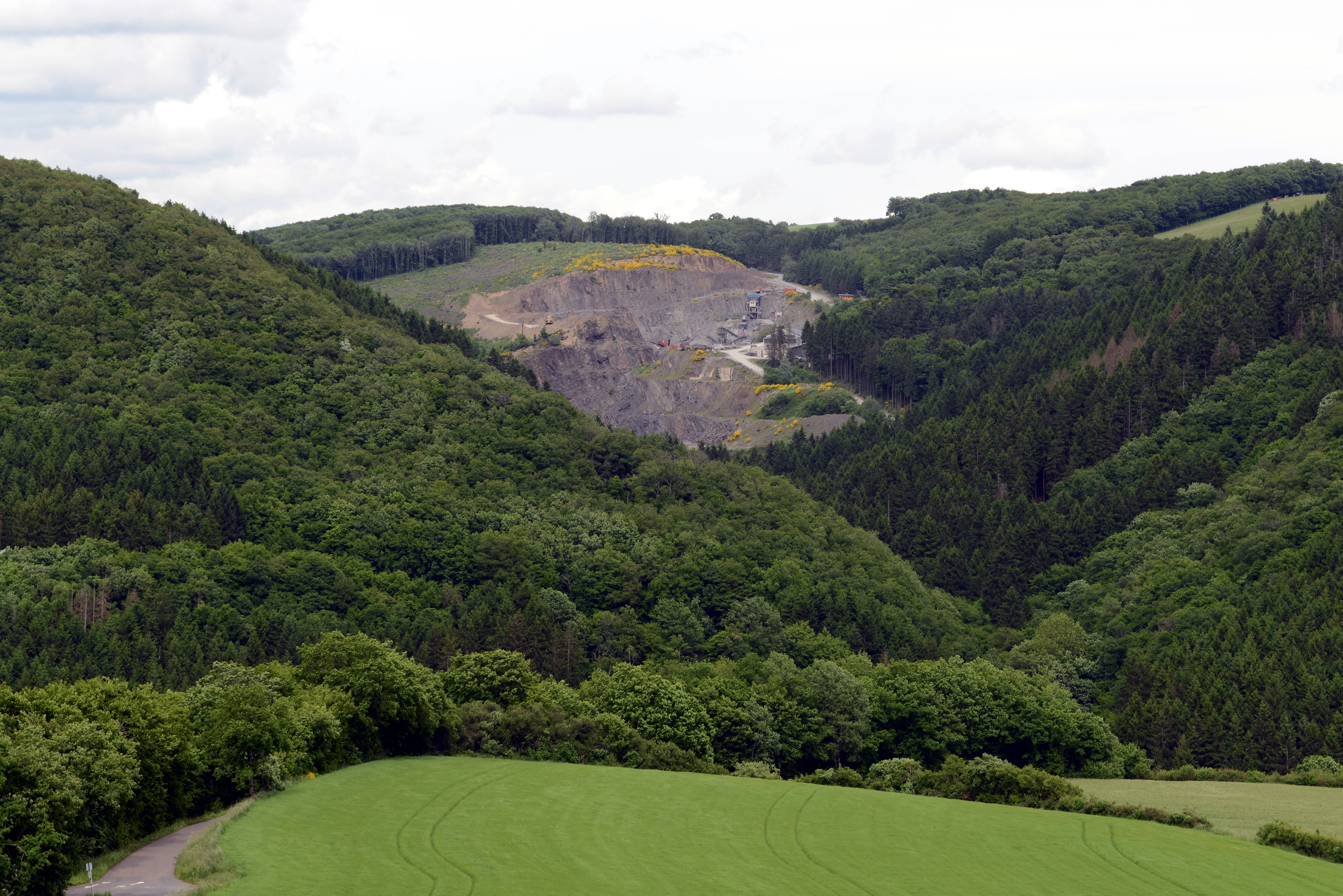 Carrières Rinnen zu Konstem vun Alschent gesinn.